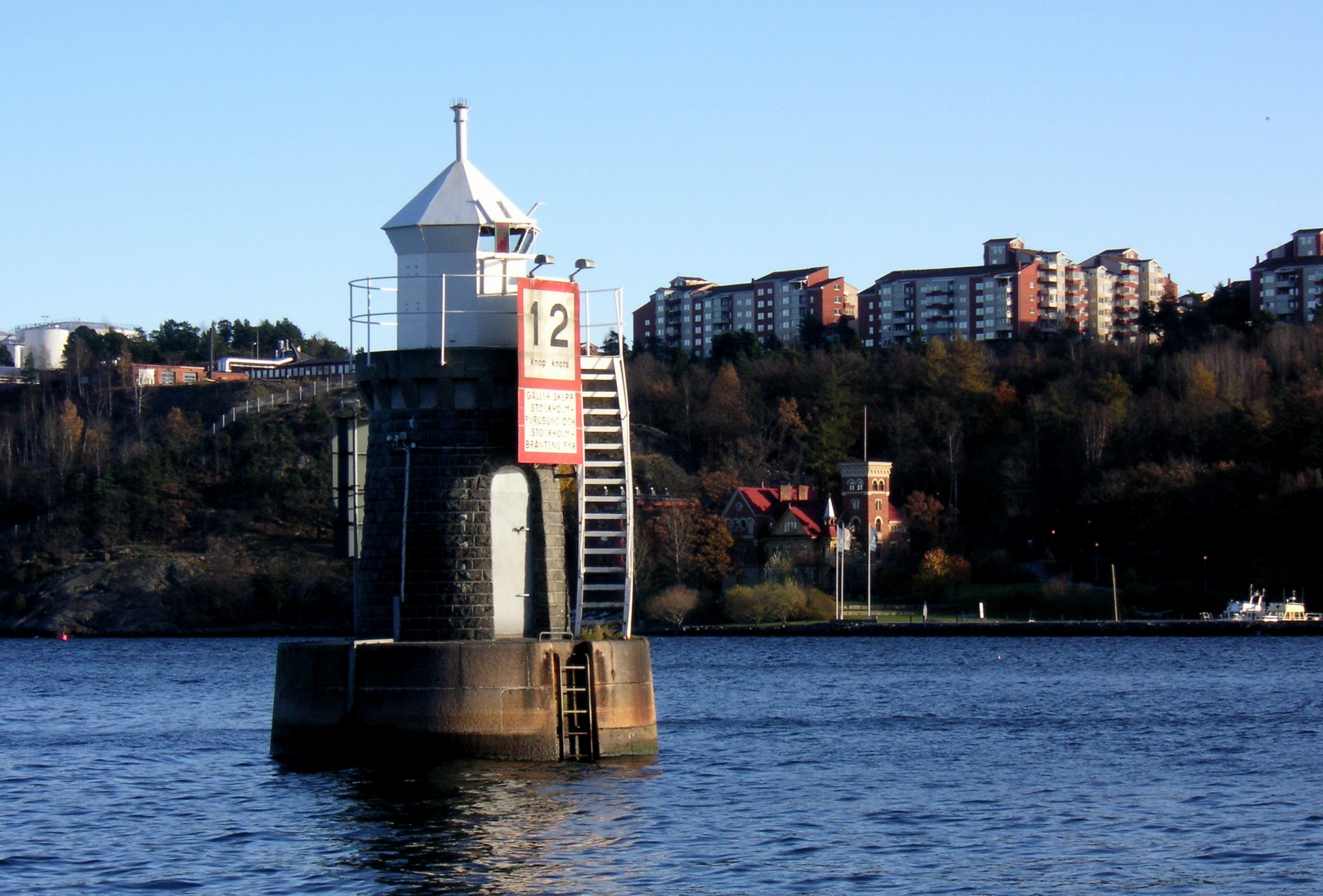 Gustav Daléns erstes Blinkfeuer im Einlauf von Stockholm